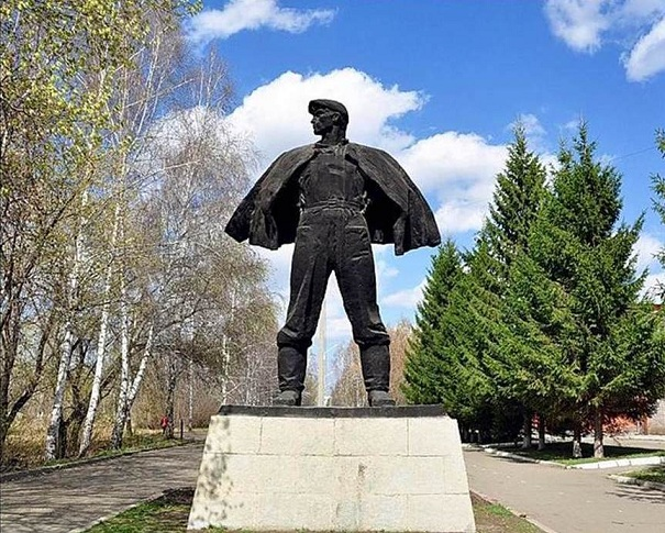 «Хозяин целинных полей», монумент подвигу целинников, Барнаул, 1985. Автор: М.Л. Сковородин.